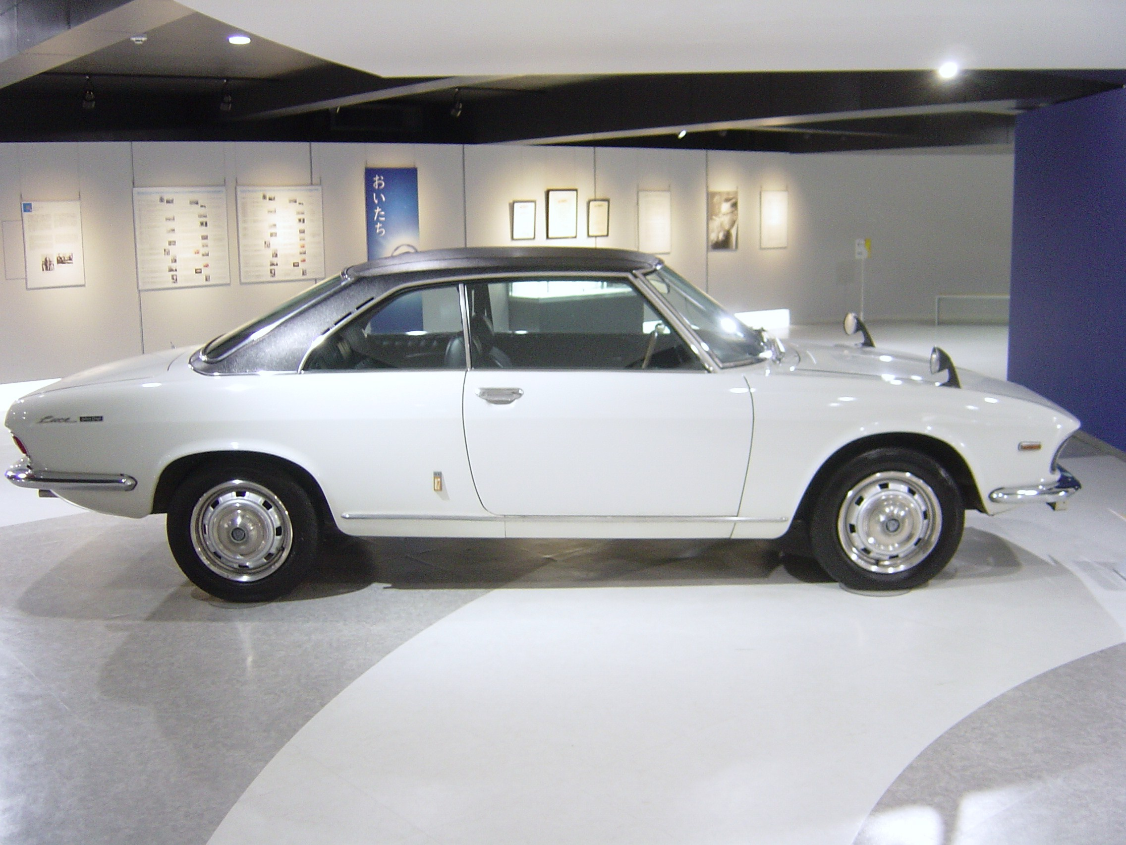 Mazda Luce(マツダ・ルーチェ),Mazda Museum